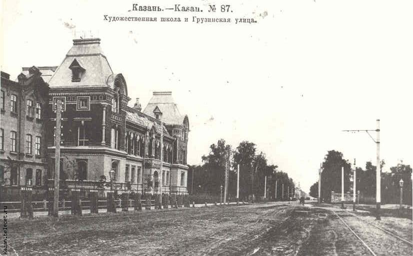 Казань. Художественная школа и Грузинская улица.